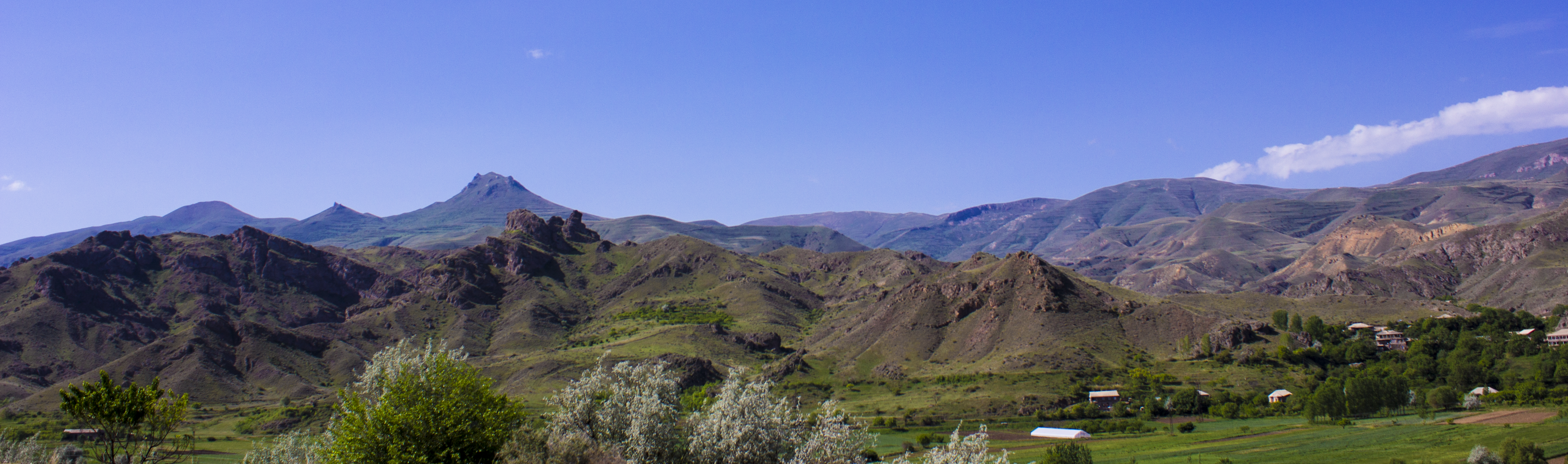 Լեռներ Եղեգնաձոր-Վայք ճանապարհի աջ կողմում